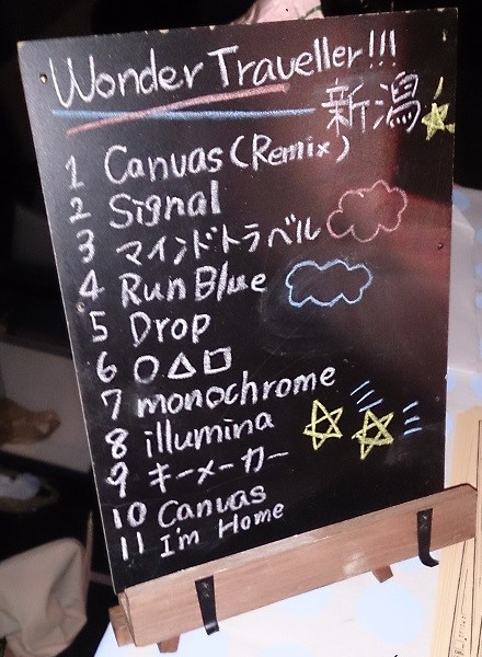 amiinaセトリボード(20150905(1))